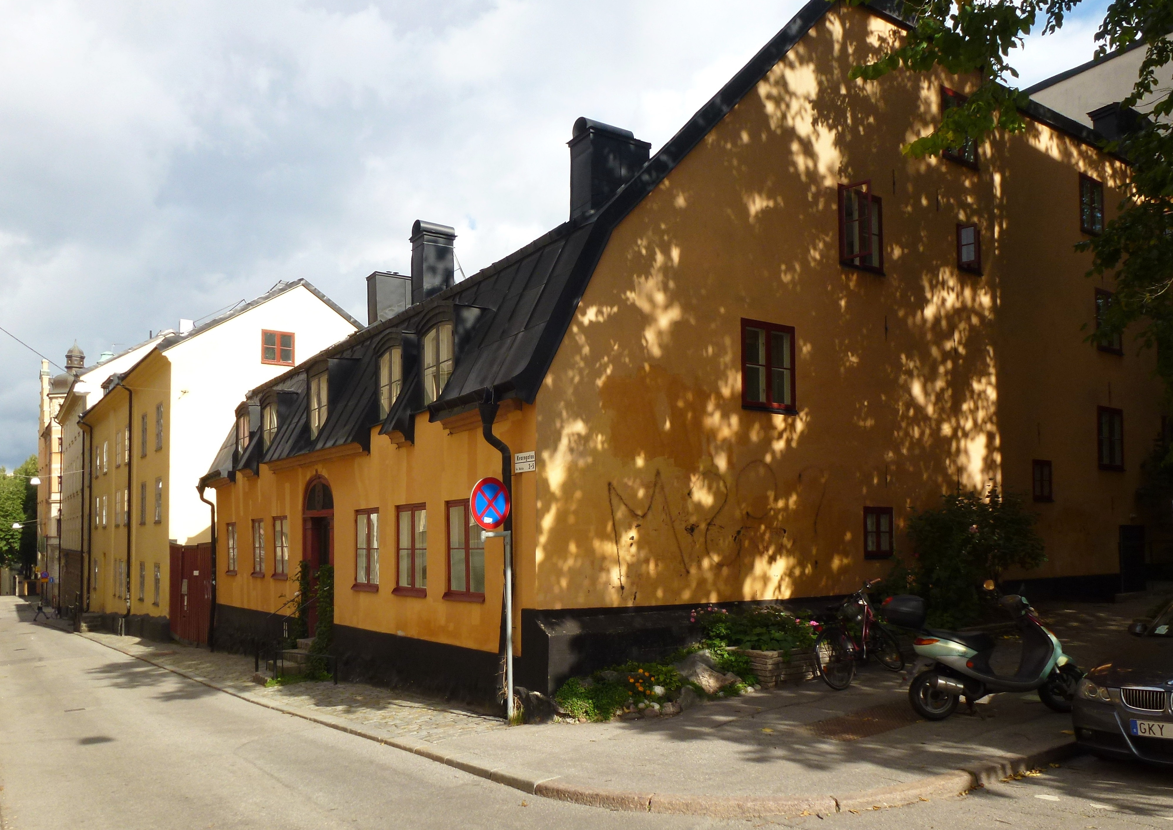 Kvarngatan Södermalm, vy norrut